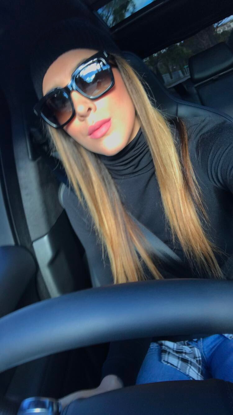 Daniela Ospina via stories